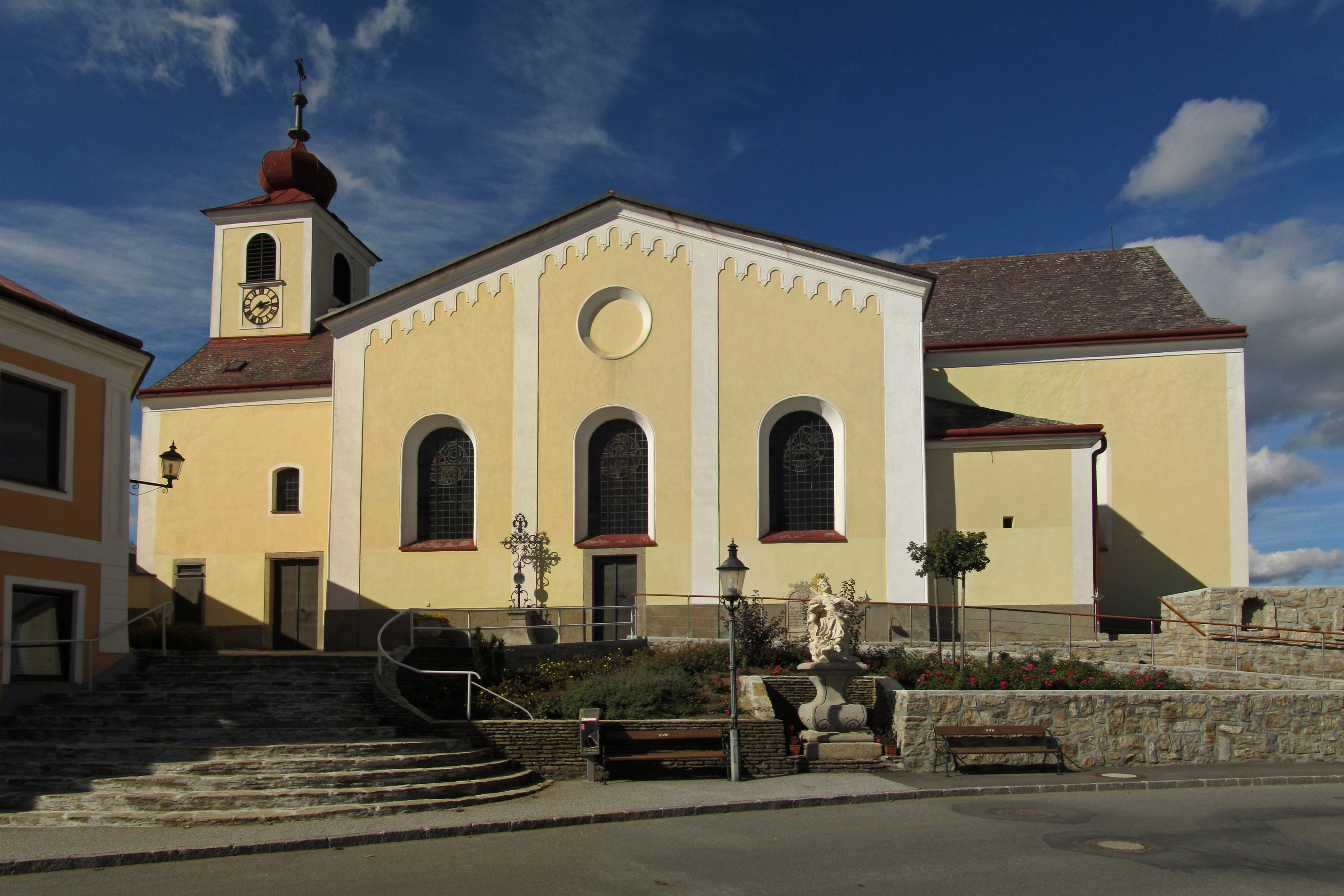 Ursprünglich einschiffiger Barockbau mit im Kern gotischem Rechteckchor und Fassadenturm von 1806/07. 1868–70 zu dreischiffiger Halle verbreitert.